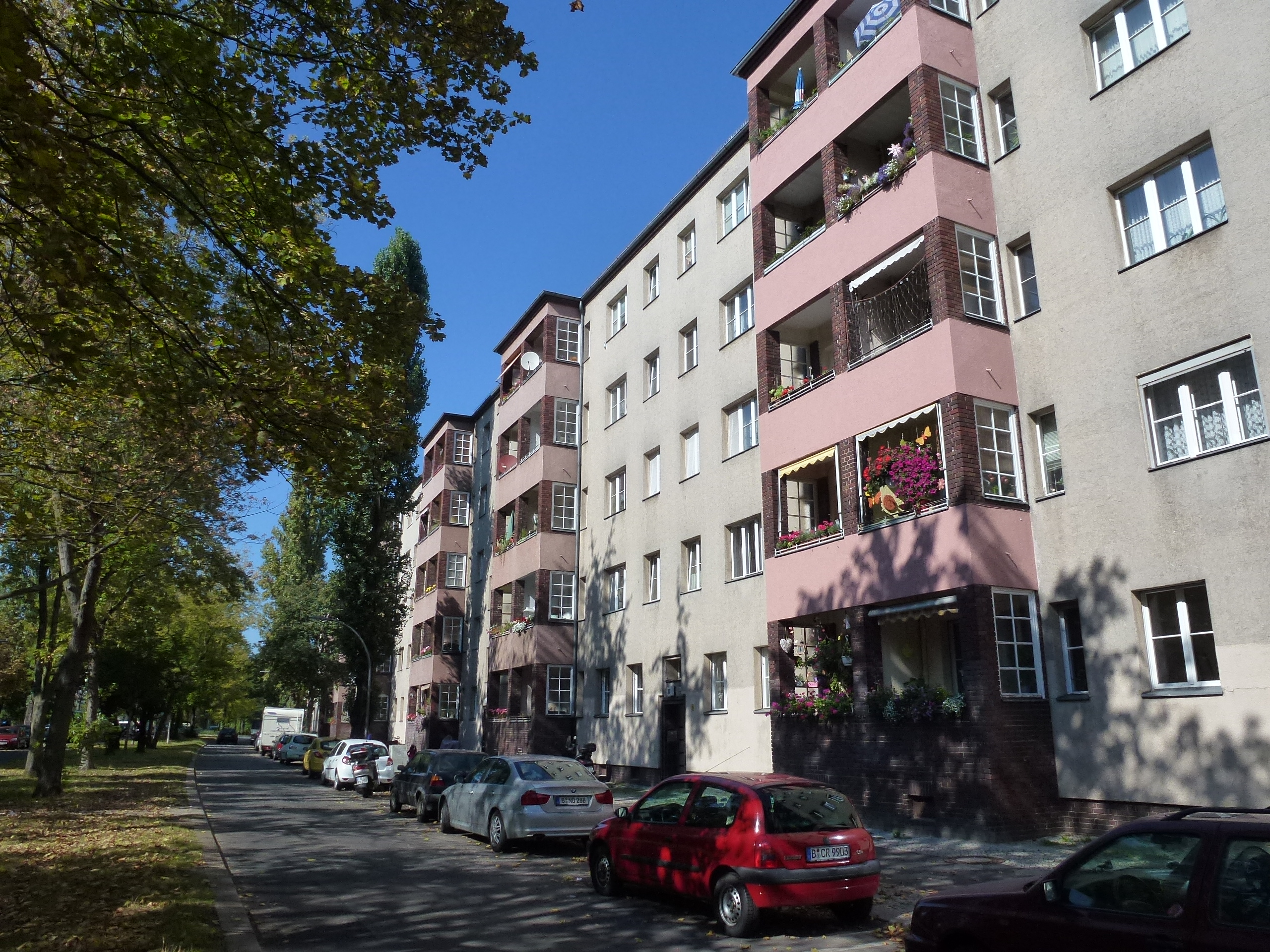 Berlin-Tempelhof Loewenhardtdamm Wohnanlage von Fritz Bräuning